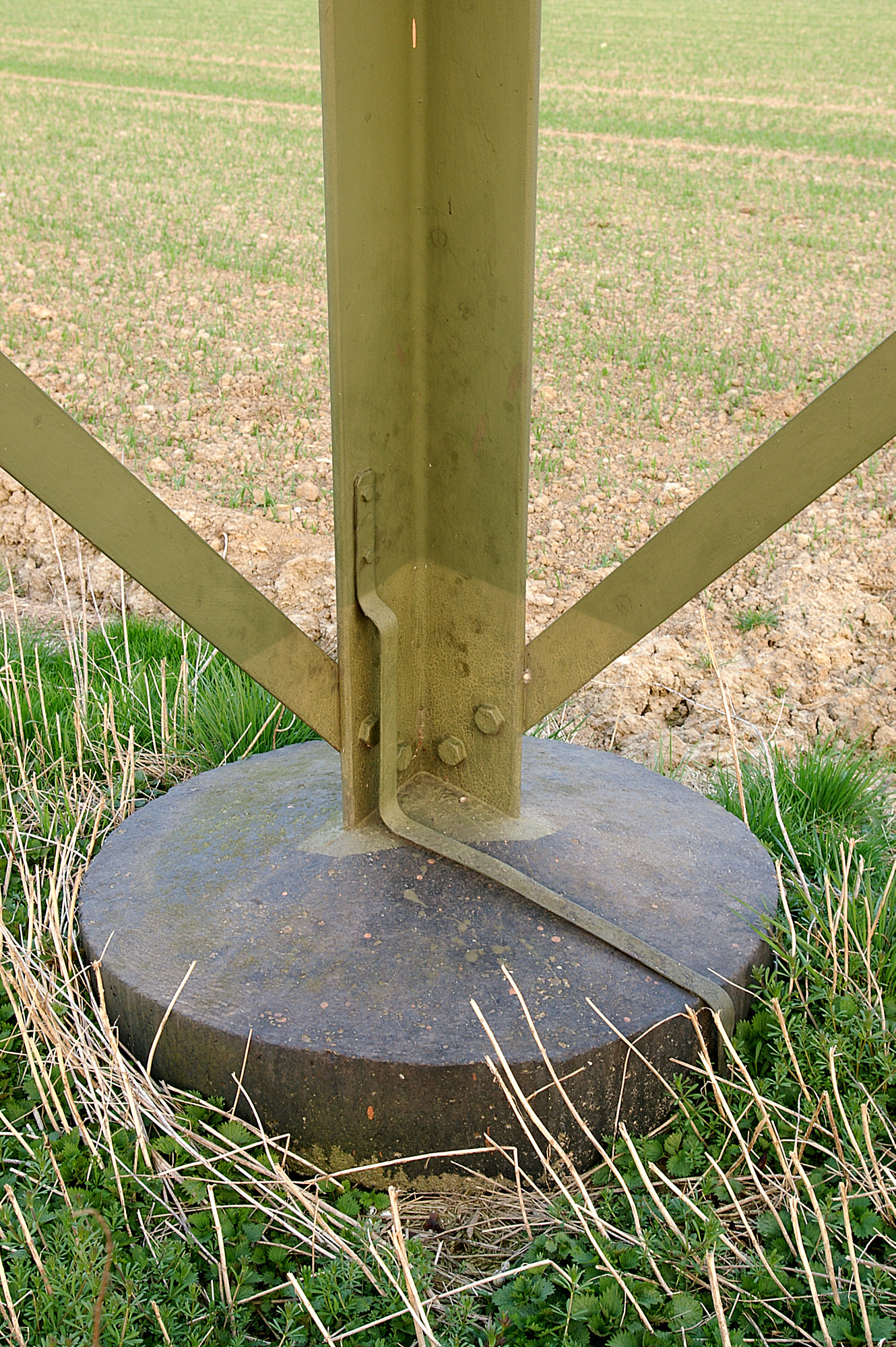 Punktfundament eines Hochspannungsmastes mit Erdungsband